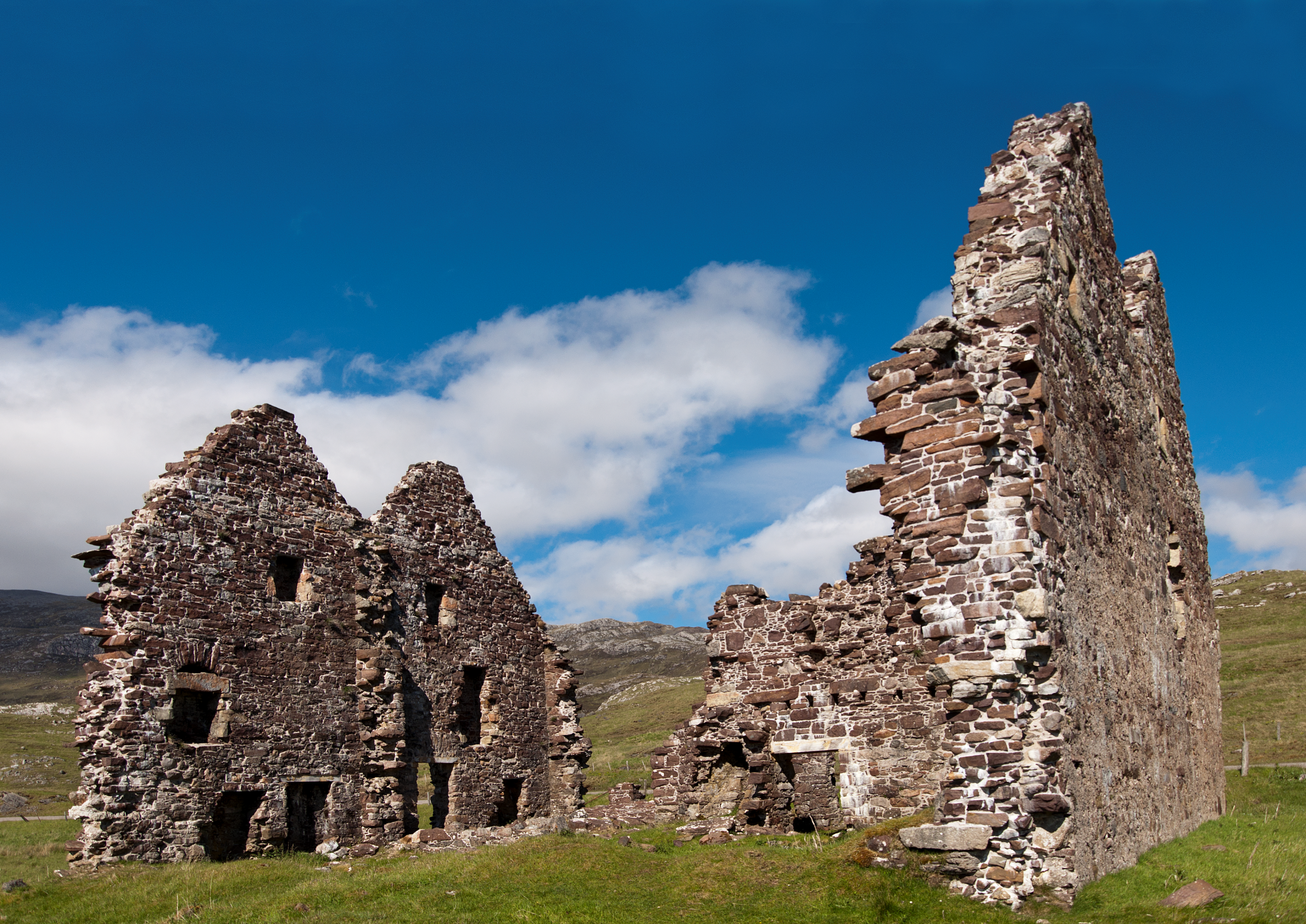 Calda House, Sutherland, Schotland